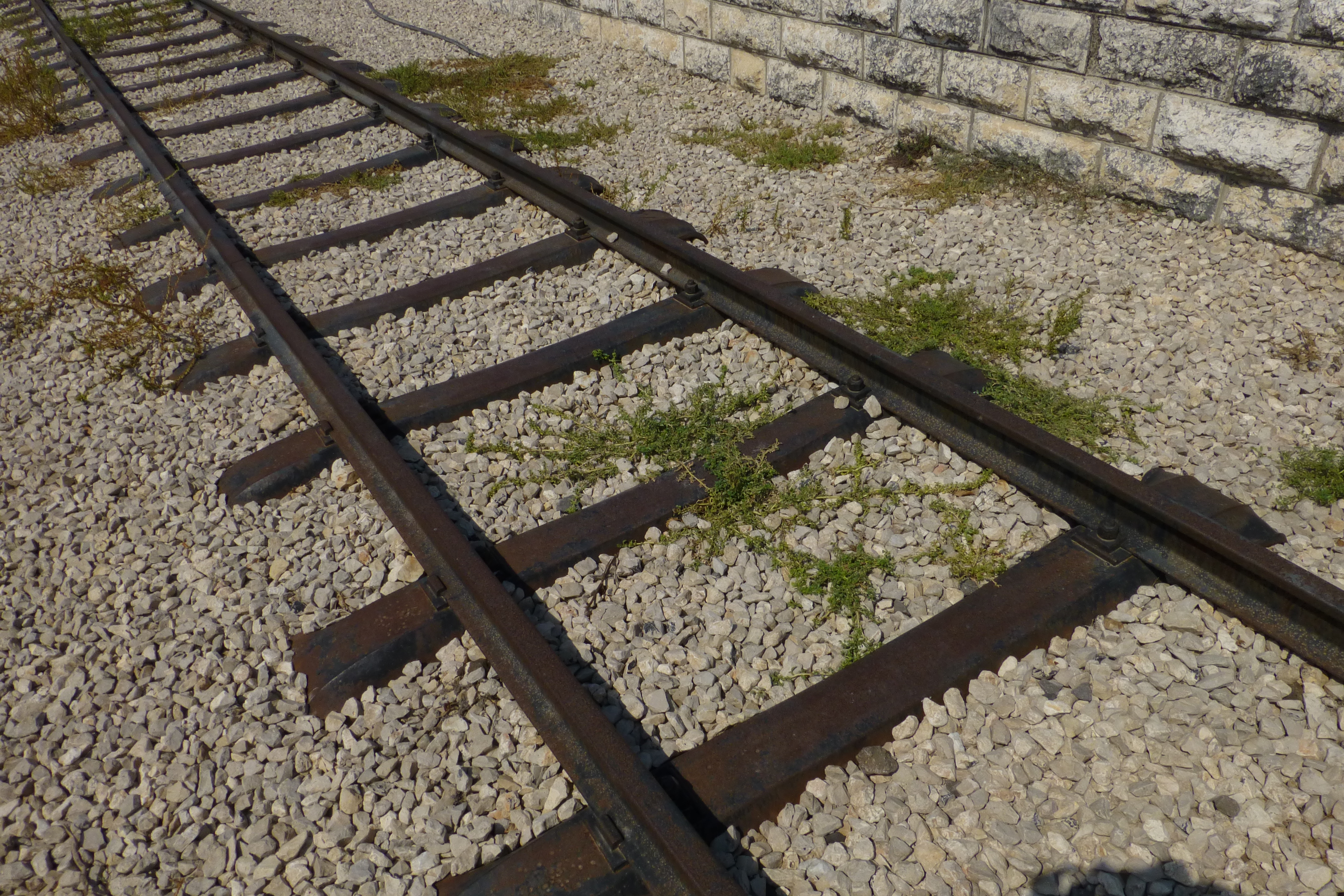 רכבת העמק - מעבירי מים והסוללה - צומת העמקים